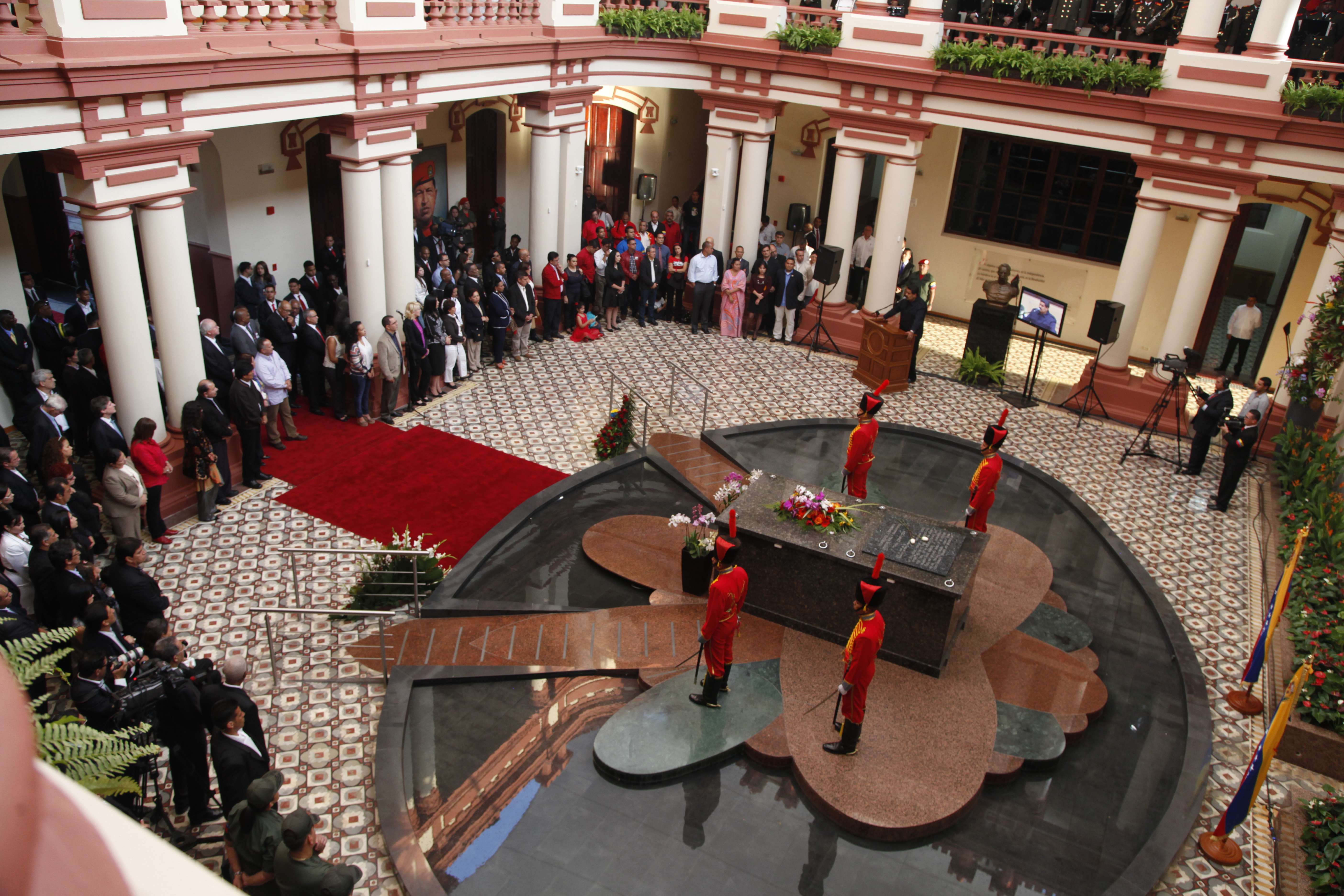 Caracas (Venezuela), 05 de Marzo del 2014. El Canciller del Ecuador, Ricardo Patiño, participó en los actos de conmemoración de la muerte del Comandante Hugo Chávez Frías. Foto: Xavier Granja Cedeño / Cancilleria Ecuador